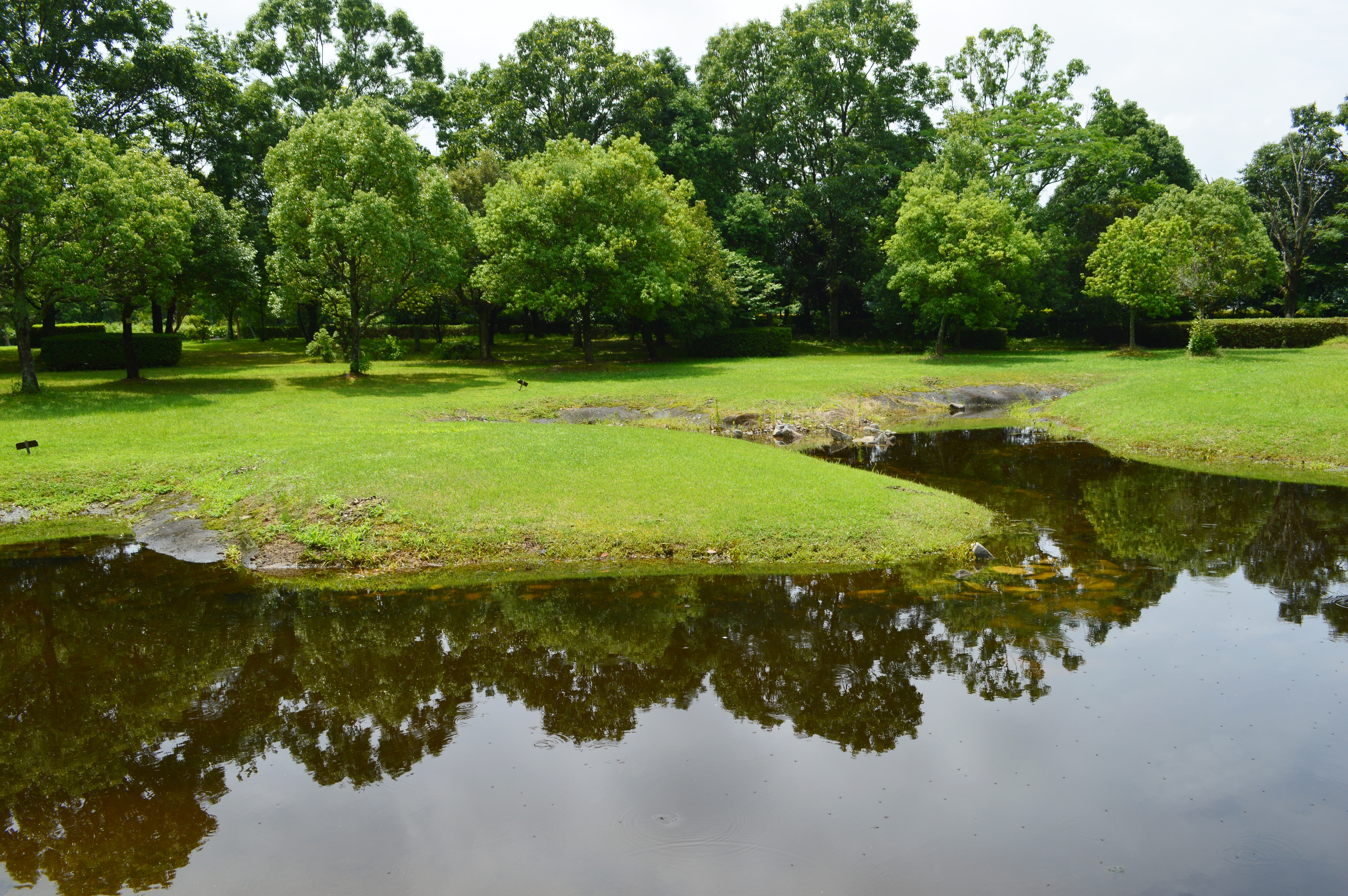 城之越遺跡 広場 Nikon D3200